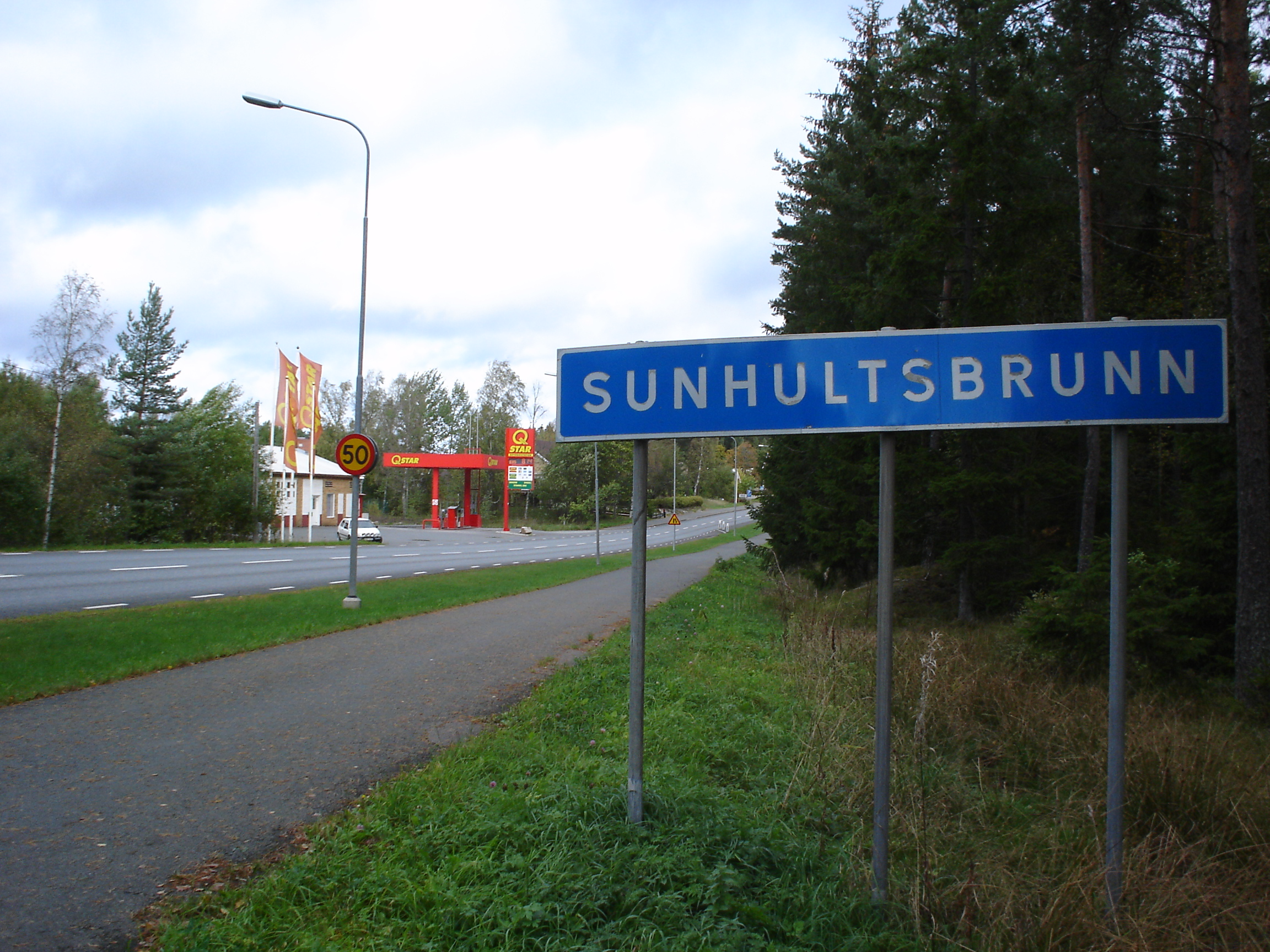 Ortsskylten vid Sunhultsbrunn